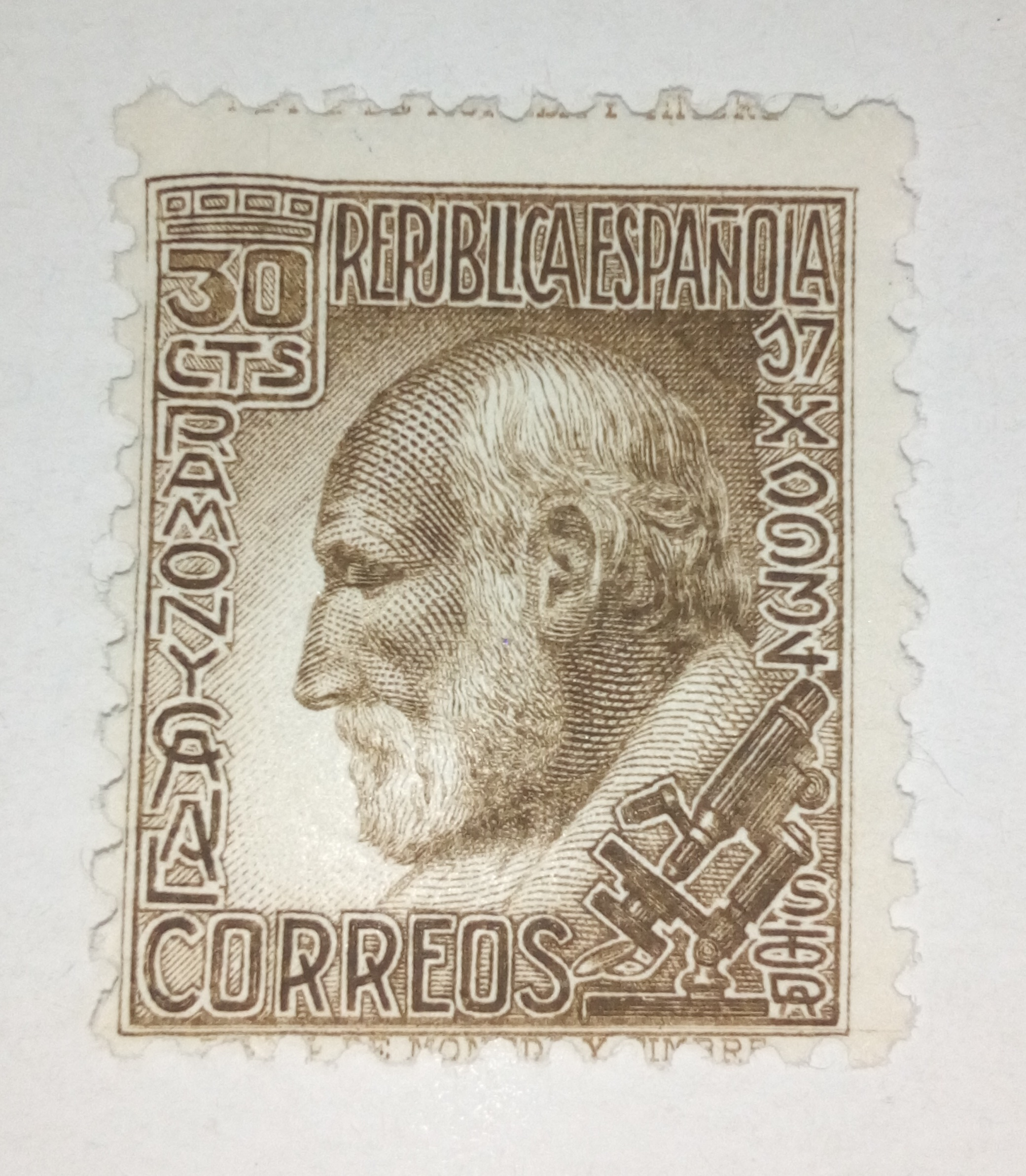 Sello de la II República Española (edifil 680) en recuerdo de la muerte de Santiago Ramón y Cajal, 1934